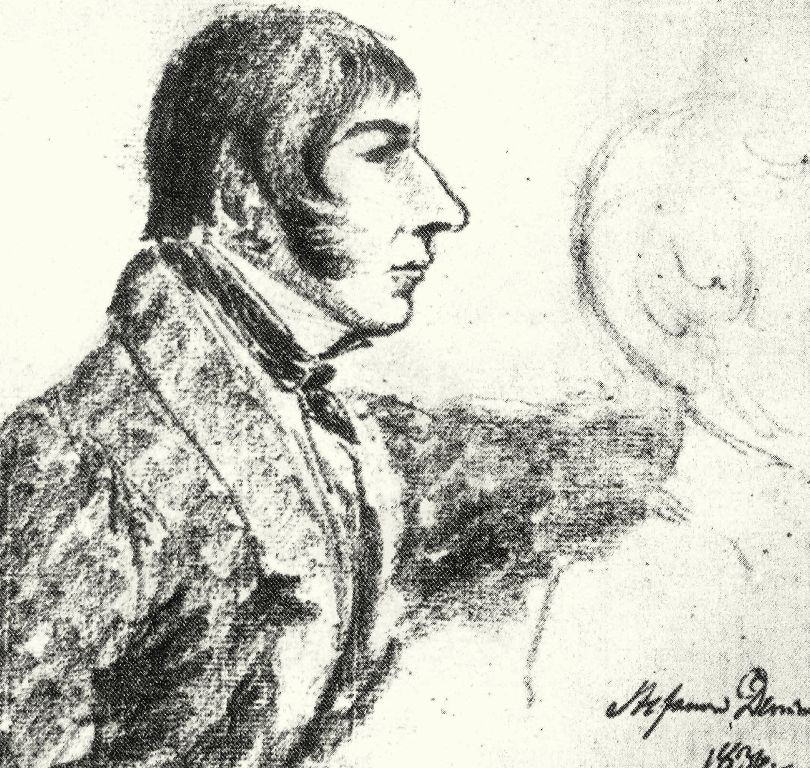 Дамінік СтафановічБеларуская (тарашкевіца): Партрэт Дамініка Стафановіча (Daminik Stafanovič)